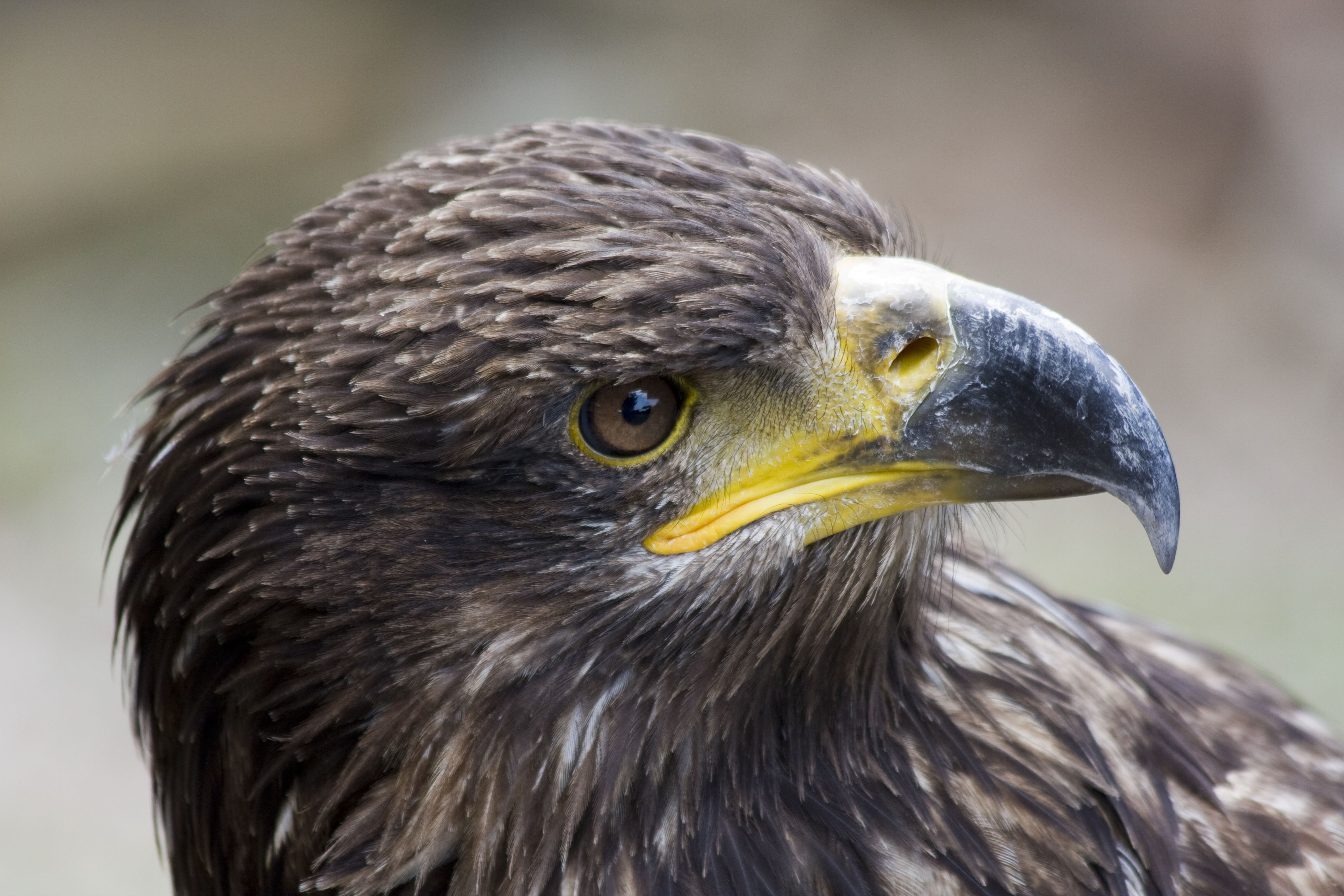 Aquila heliaca